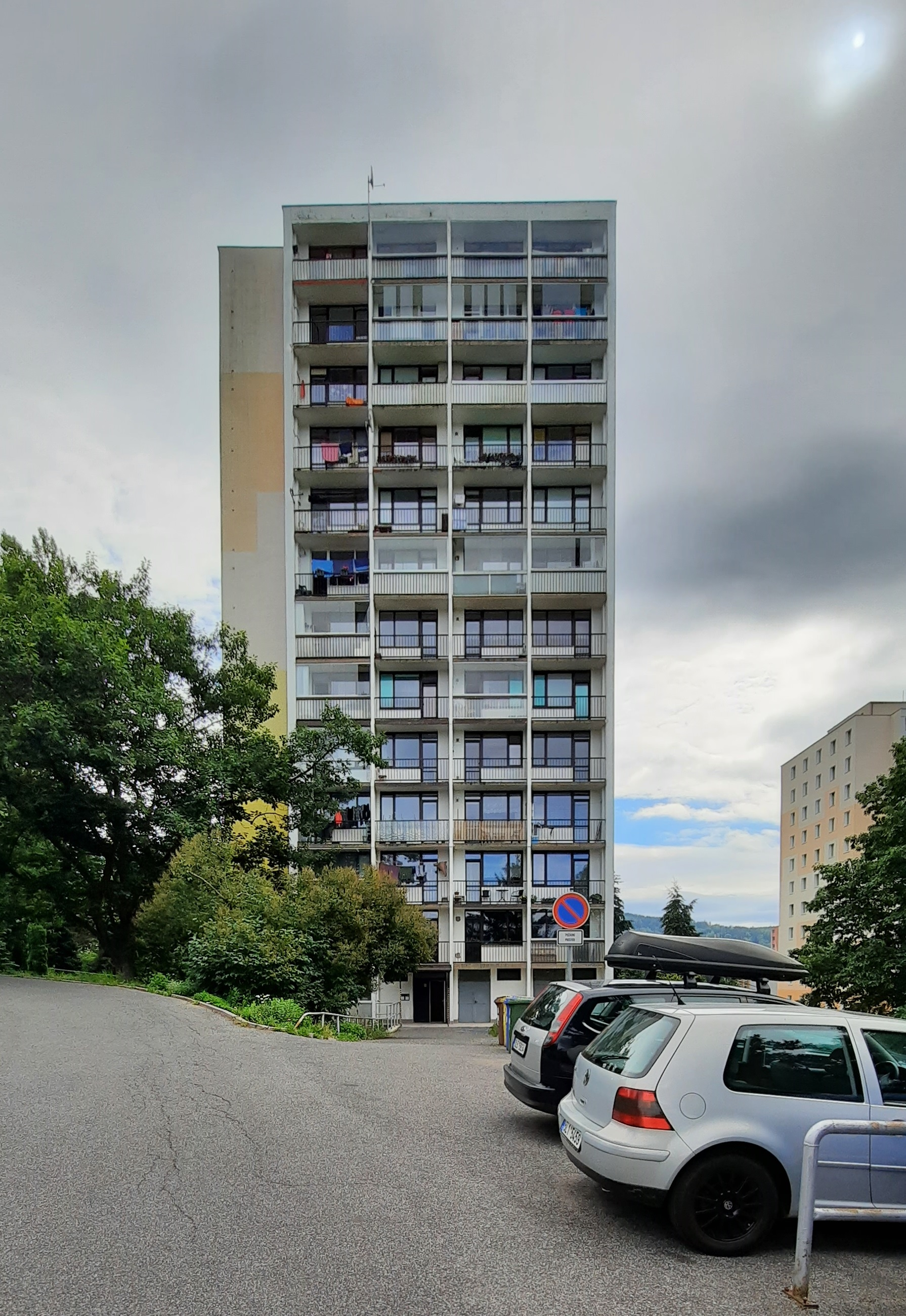 Panelový dům T06B v tanvaldské ulici U Lesíka.